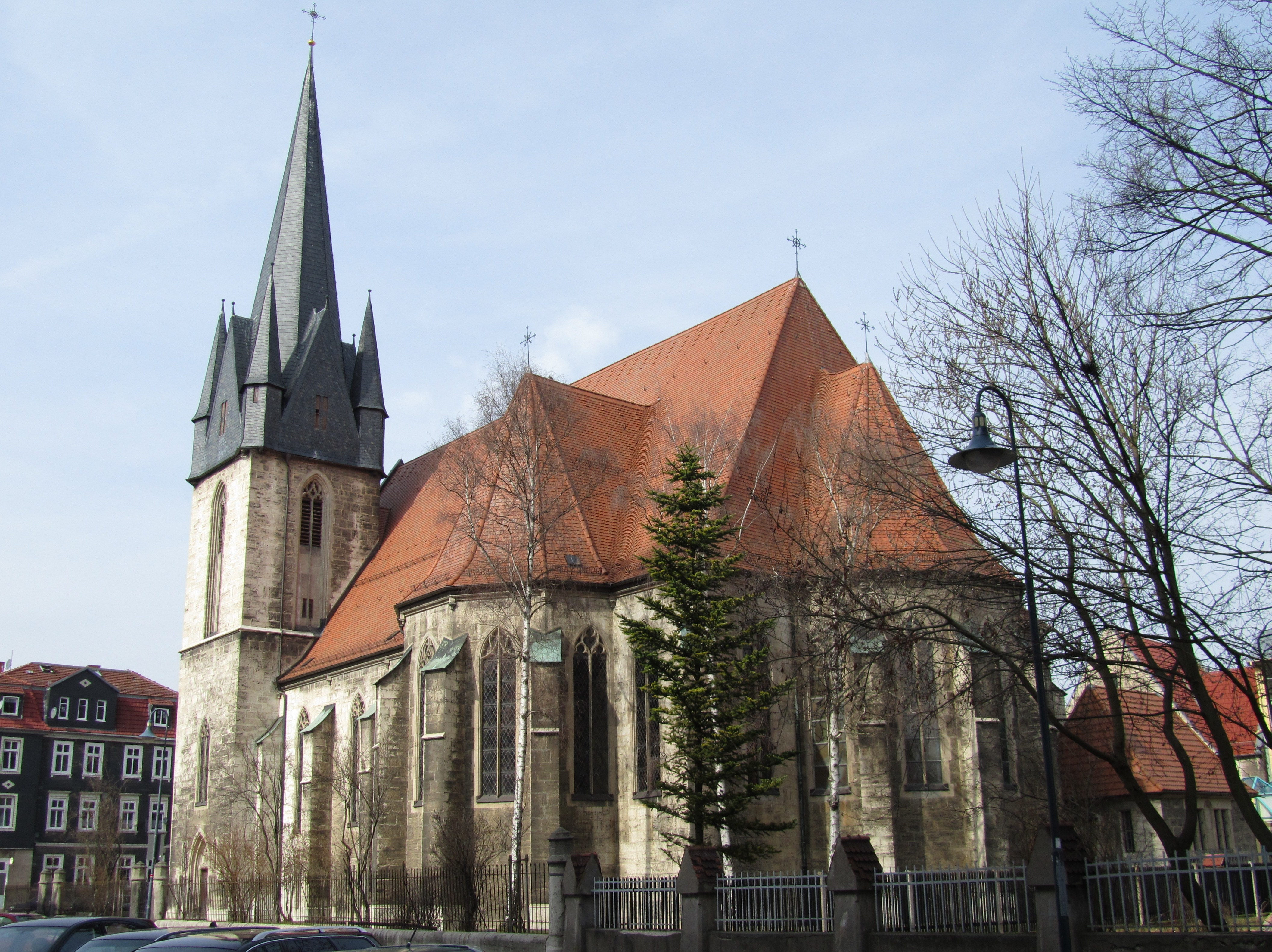 Die Josefskirche in Mühlhausen (Thüringen).